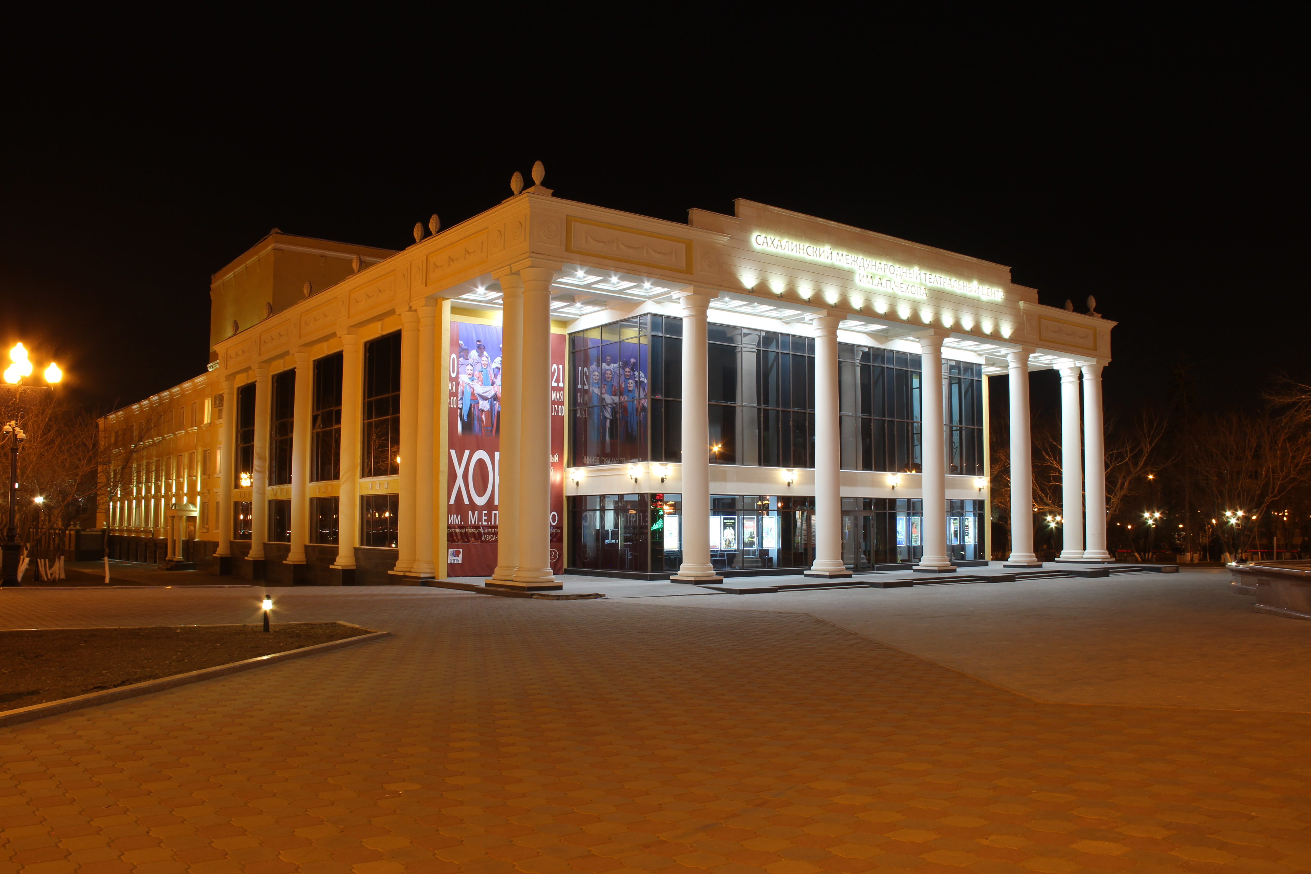 Chekhov Center Yuzhno-Sakhalinsk in April 2015